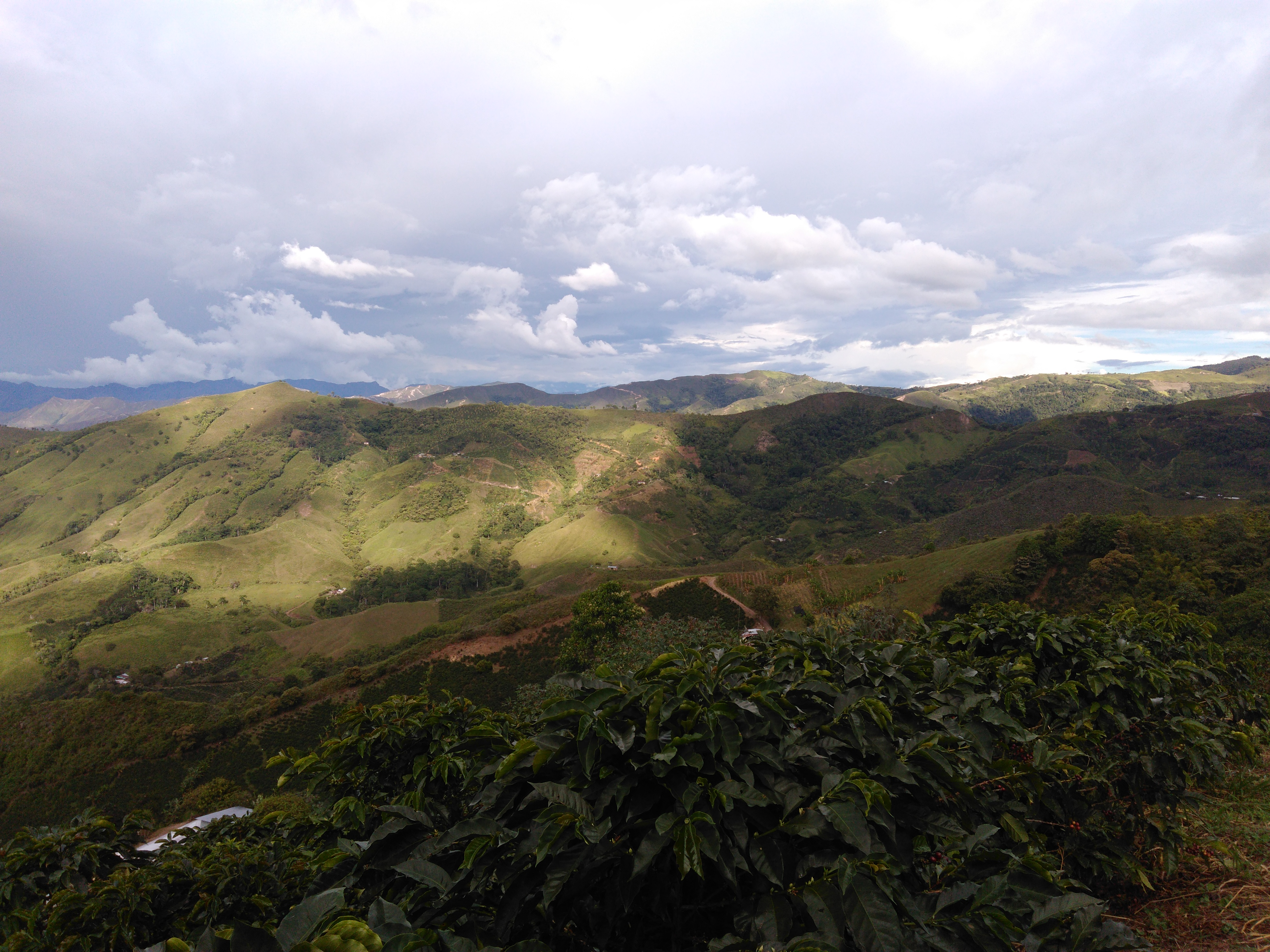 Esta fotografía fue tomada en el municipio colombiano con código 41016.